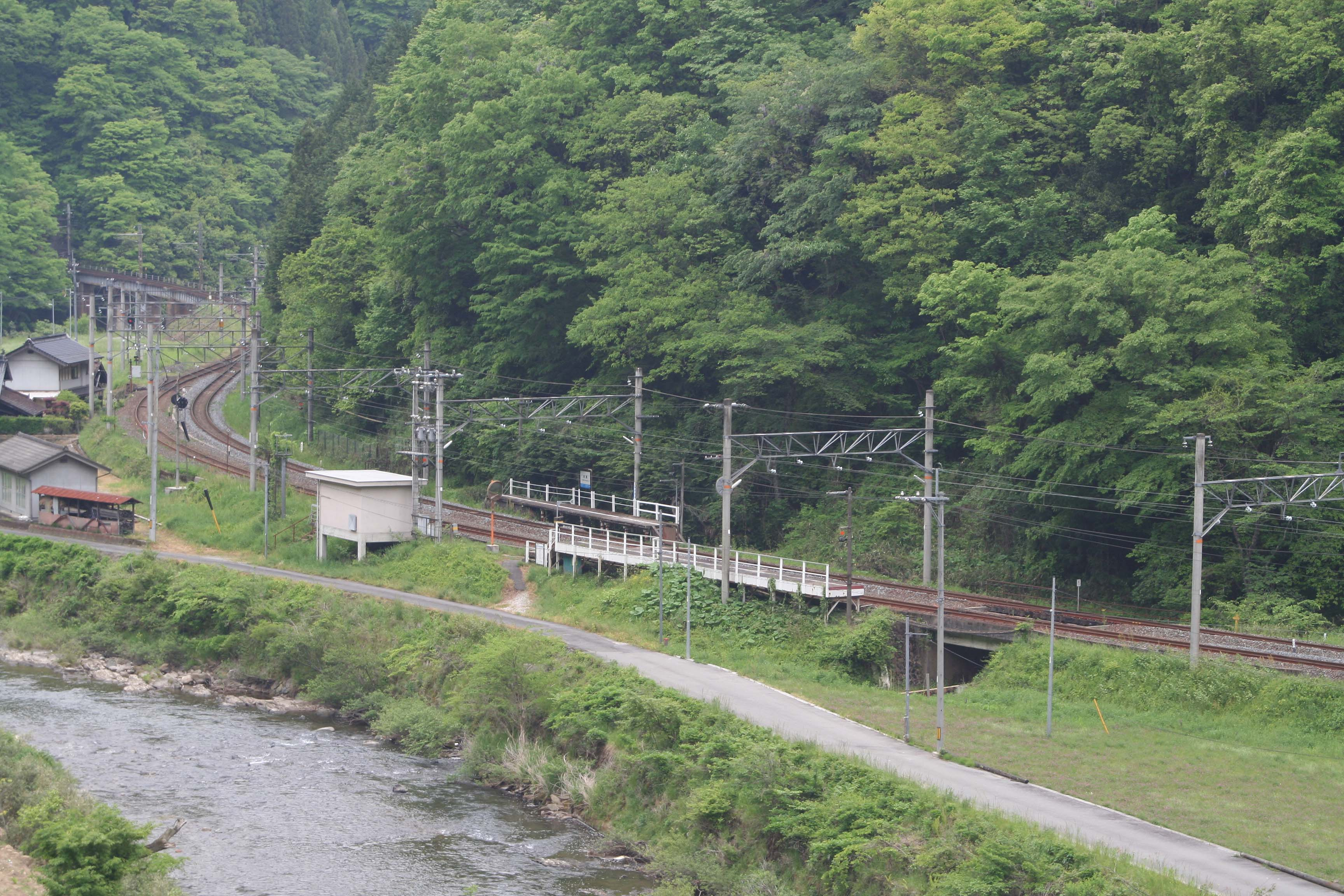 布原駅の全体の様子